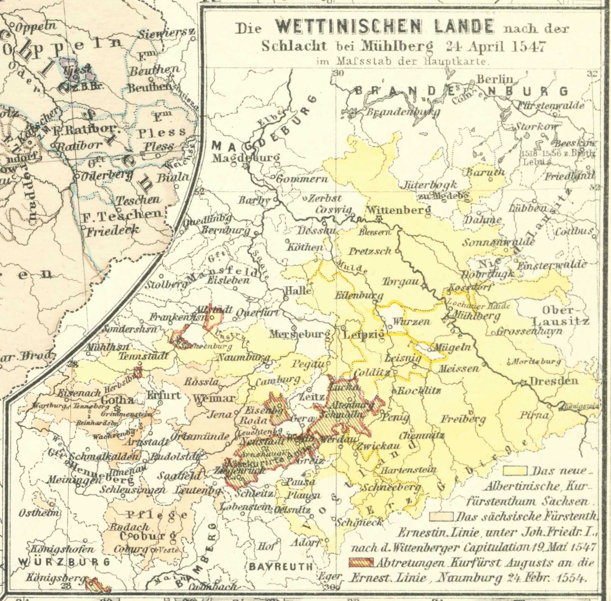 Die Wettinischen Lande nach der Schlacht von Mühlberg, 24. April 1547